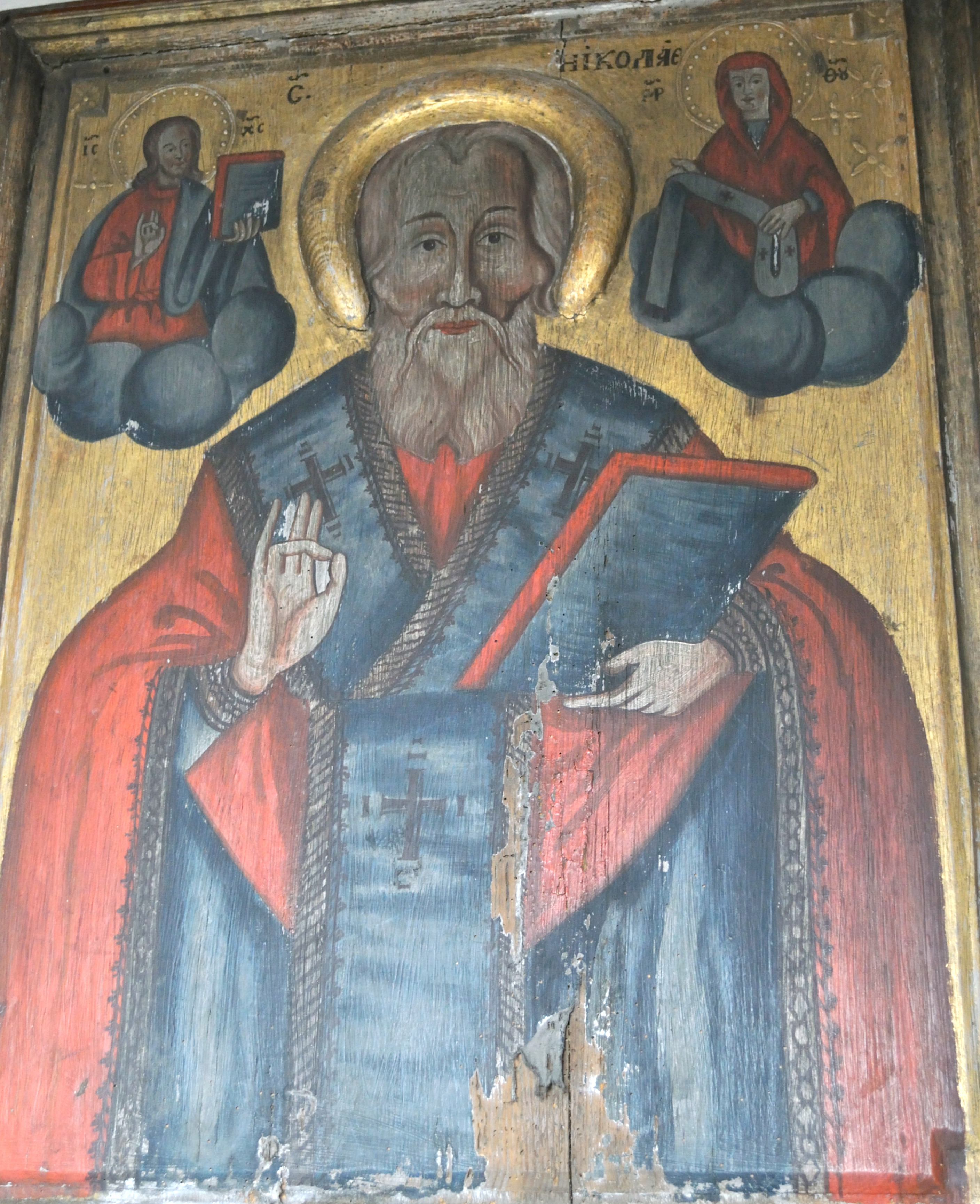 Biserica de lemn „Sfinții Arhangheli” din Ciuleni, județul Cluj